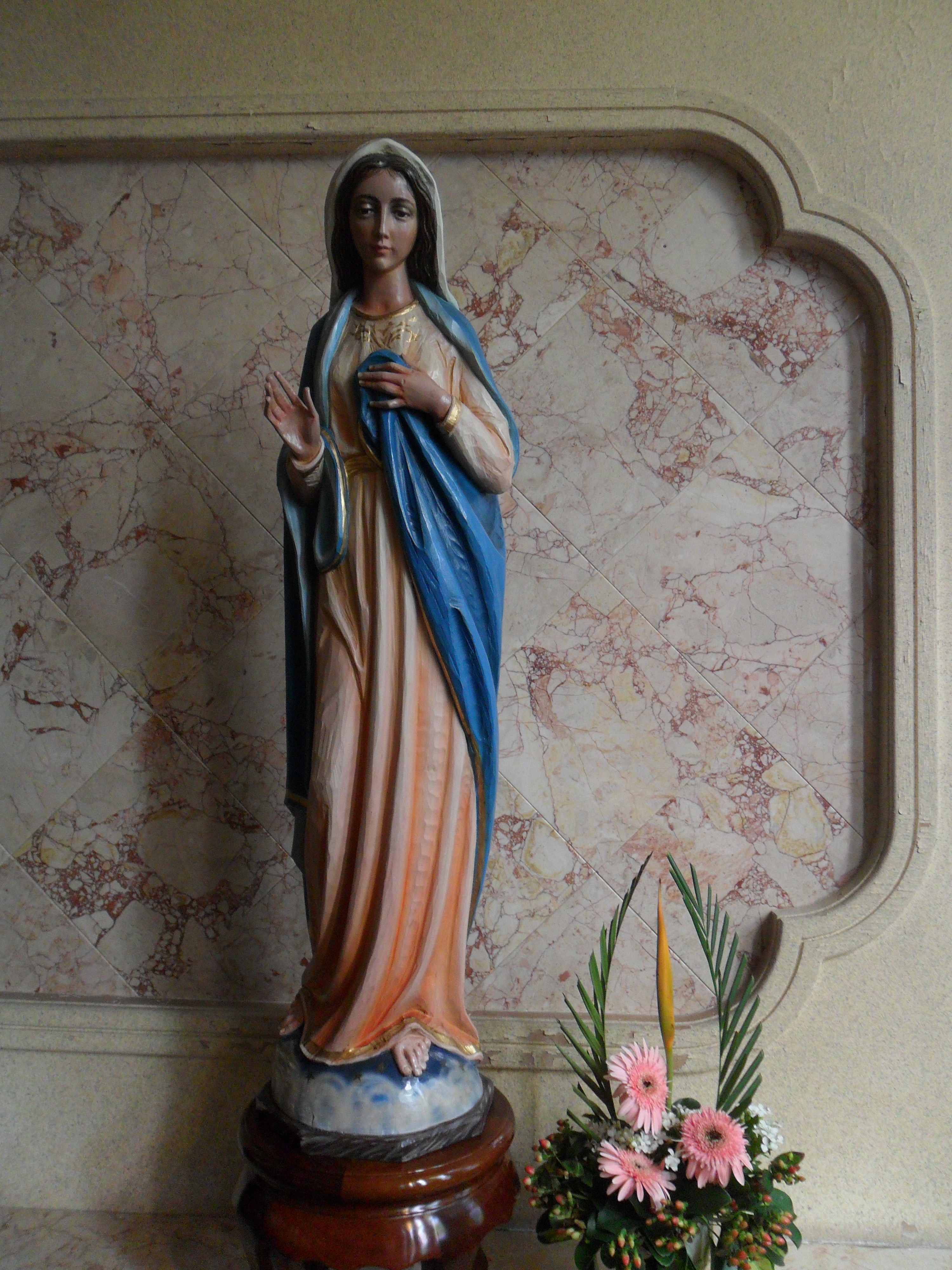 中文（香港）: 聖斯德望堂, 香港, 中國